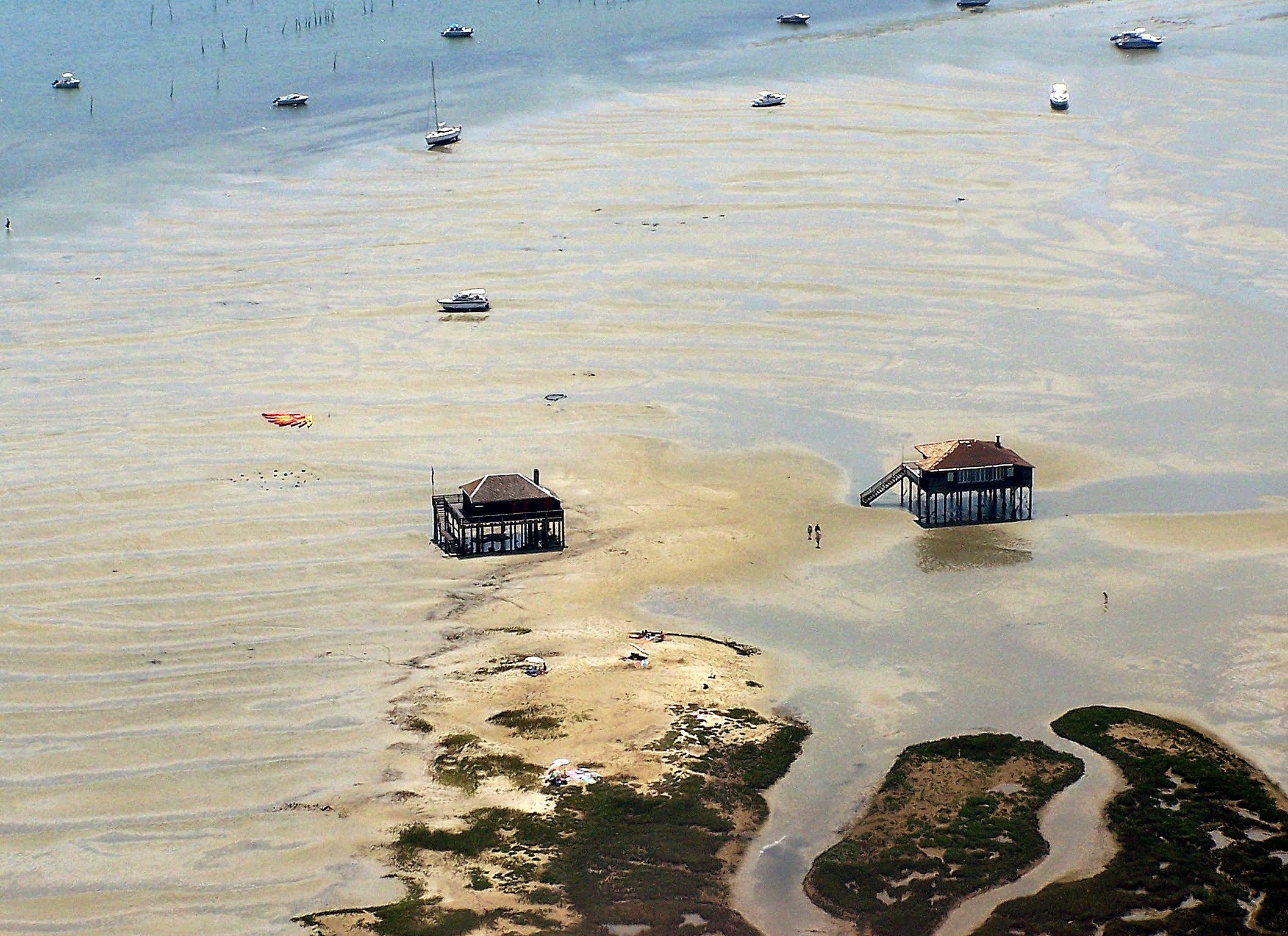 Cabanes Tachanquées